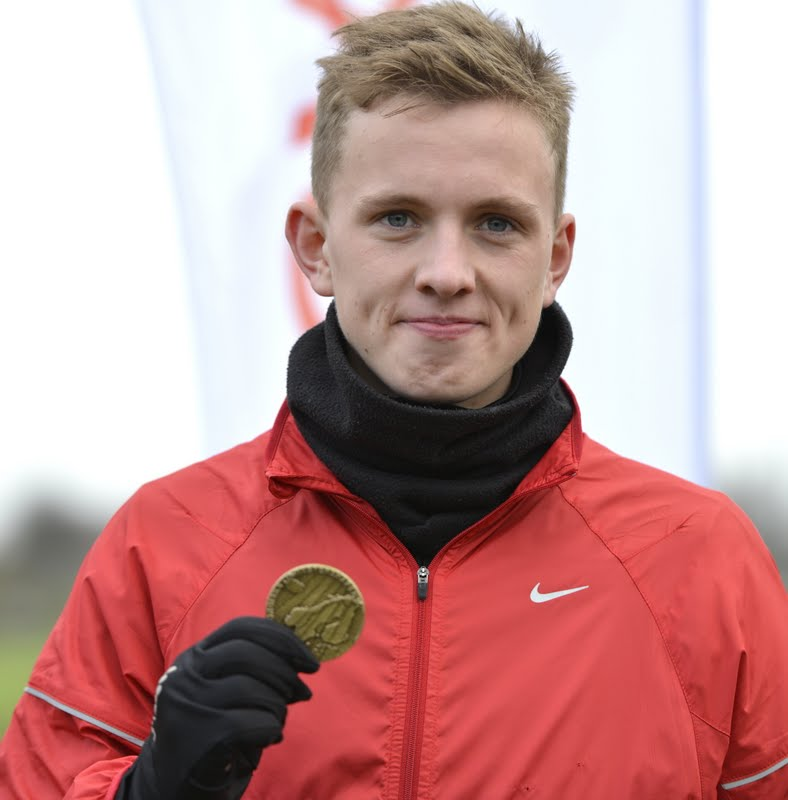 Jakob Dybdal Abrahamsen ved NM U20 i Tårnby